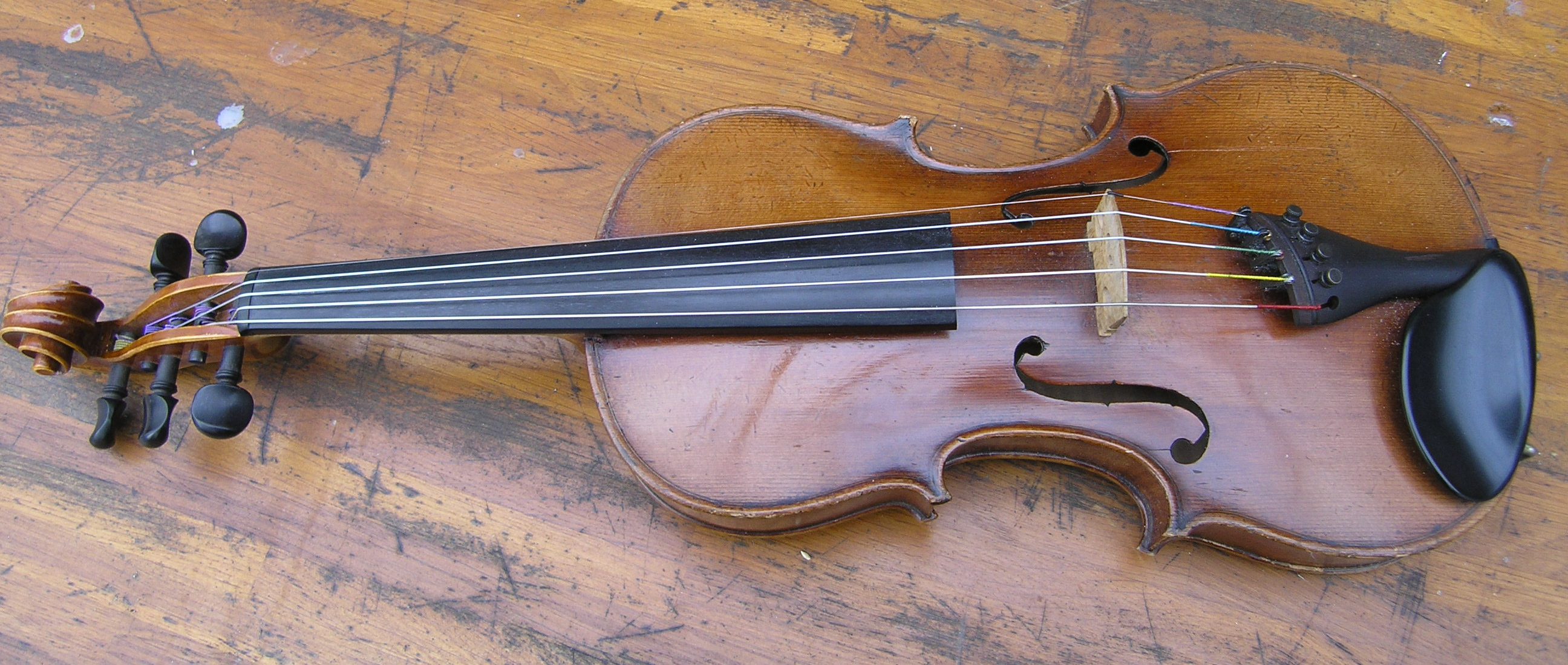 5-snarige altviool. Octrooi Wilem Wolthuis